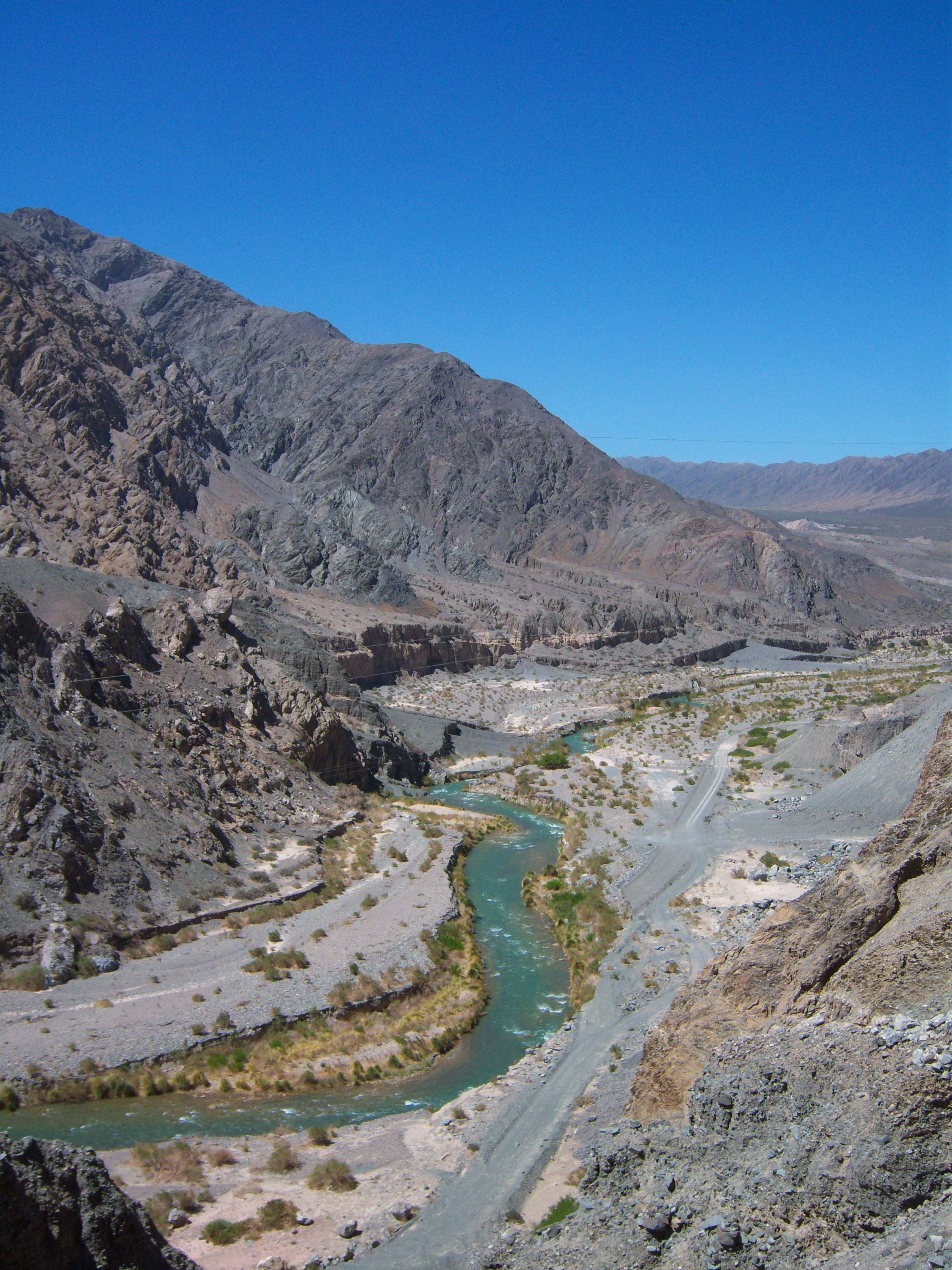 Vista del Río Jáchal, en su curso superior, entre la Ciudad de San José de Jáchal y Rodeo, desde la Ruta Nacional 150, en la provincia de San Juan, centro oeste de Argentina.